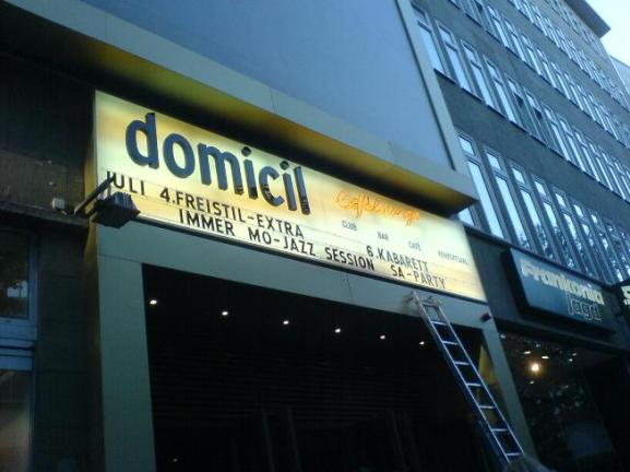 domicil, Eingangsbereich, Stefan Kronenberg, selbst aufgenommen